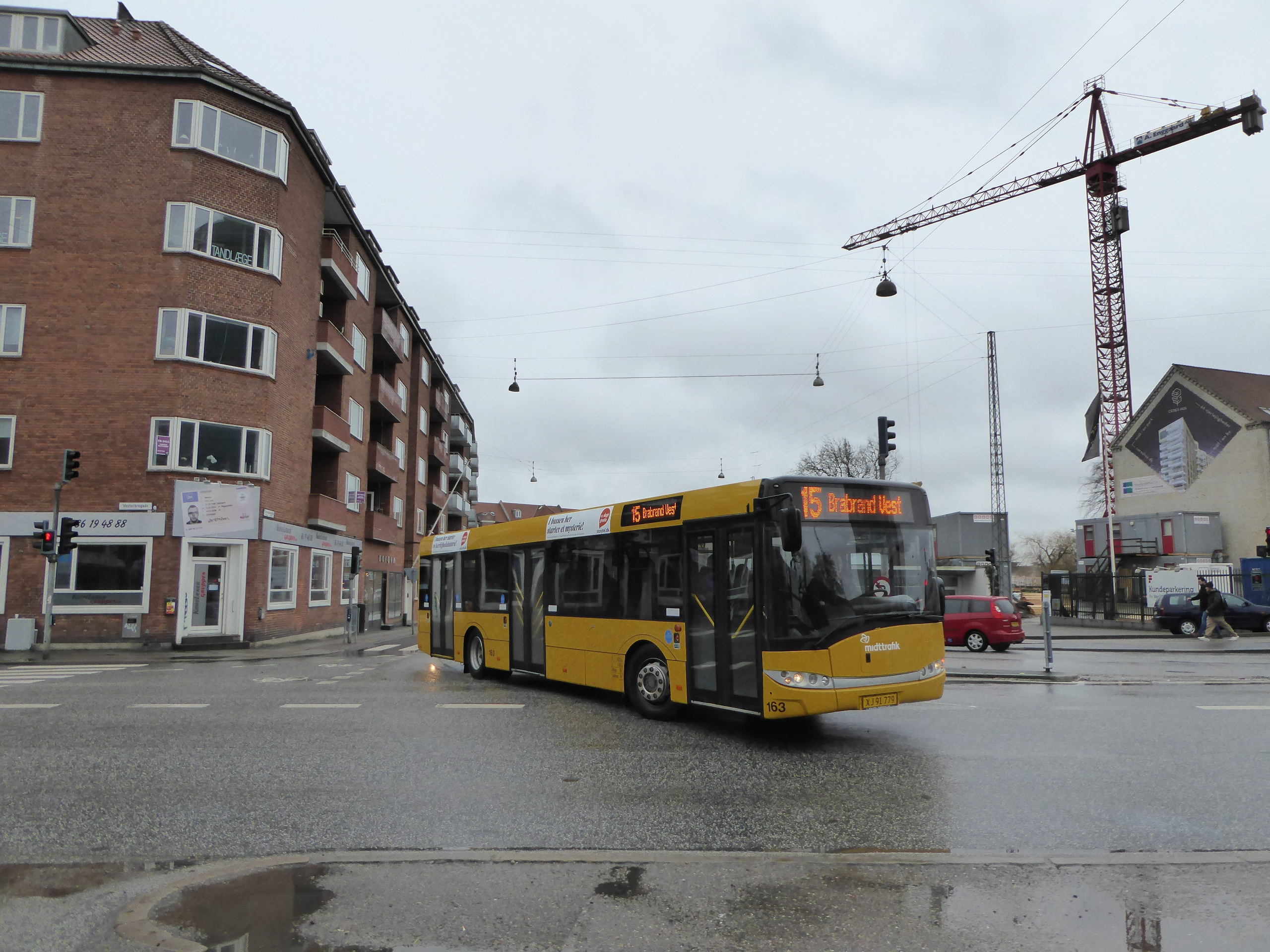 Midttrafik bus line 15 at the corner of Vesterbrogade and Thorvaldsensgade in Aarhus in Denmark.